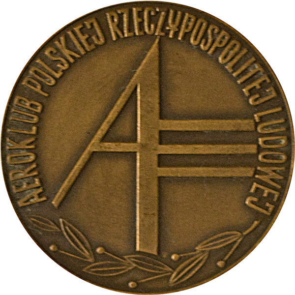 Medal należący do Tadeusza Góry nadany mu w 1970 roku. Szkoła im.Szybowników Polskich Bezmiechowa.